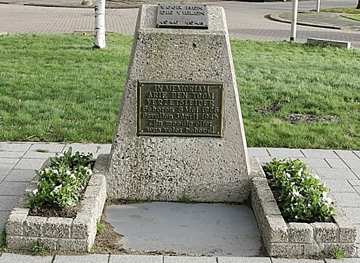 Monument verzetsstrijder Arie den Toom